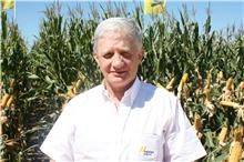 Francisco Firpo durante una exposición en Expochacra